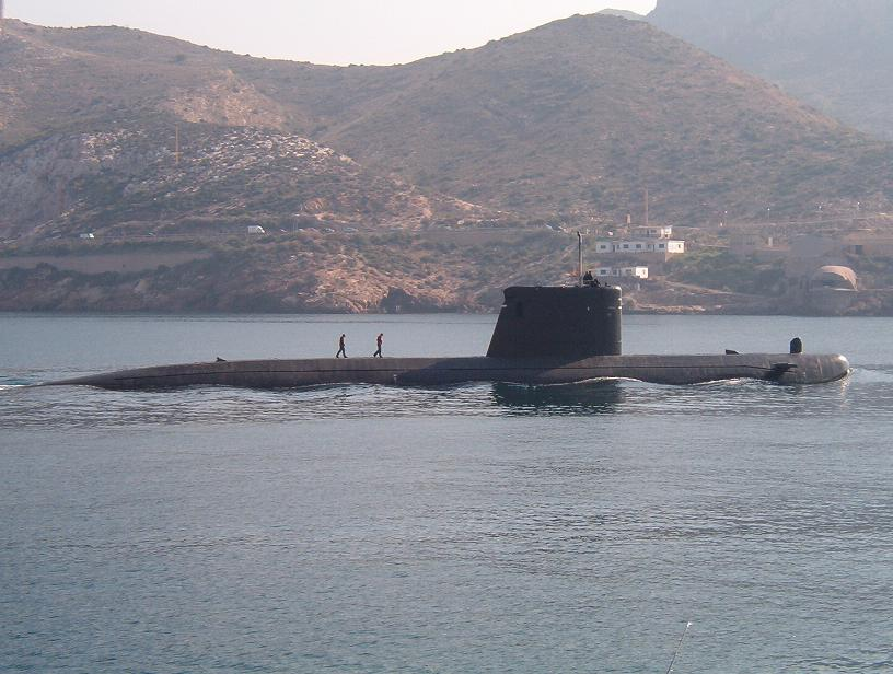 El submarino Mistral (S 73) de la Clase Galerna, en Cartagena.